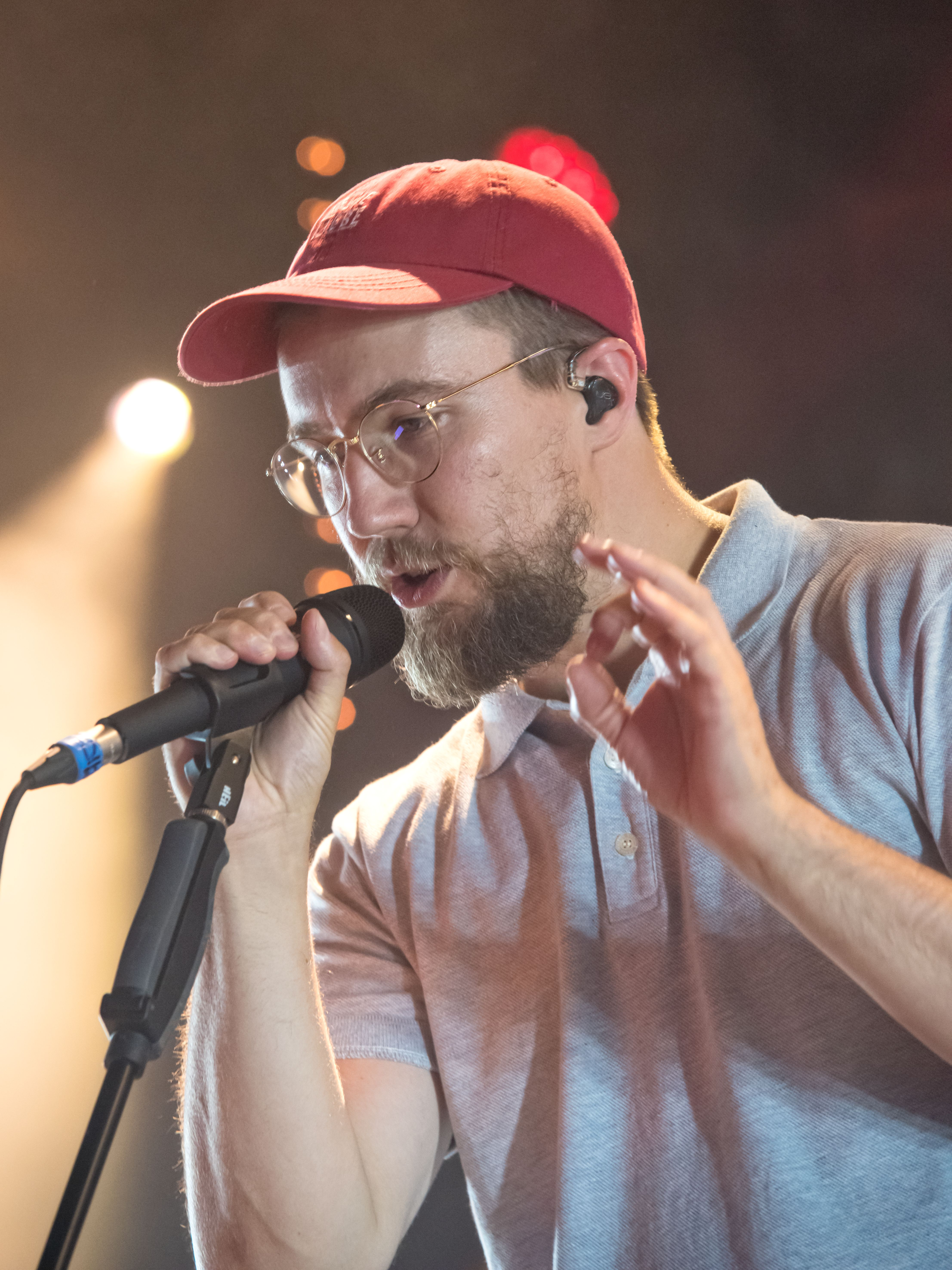 Bilder vom Zelt Musik Festival 2016 in Freiburg im Breisgau Prinz Pi